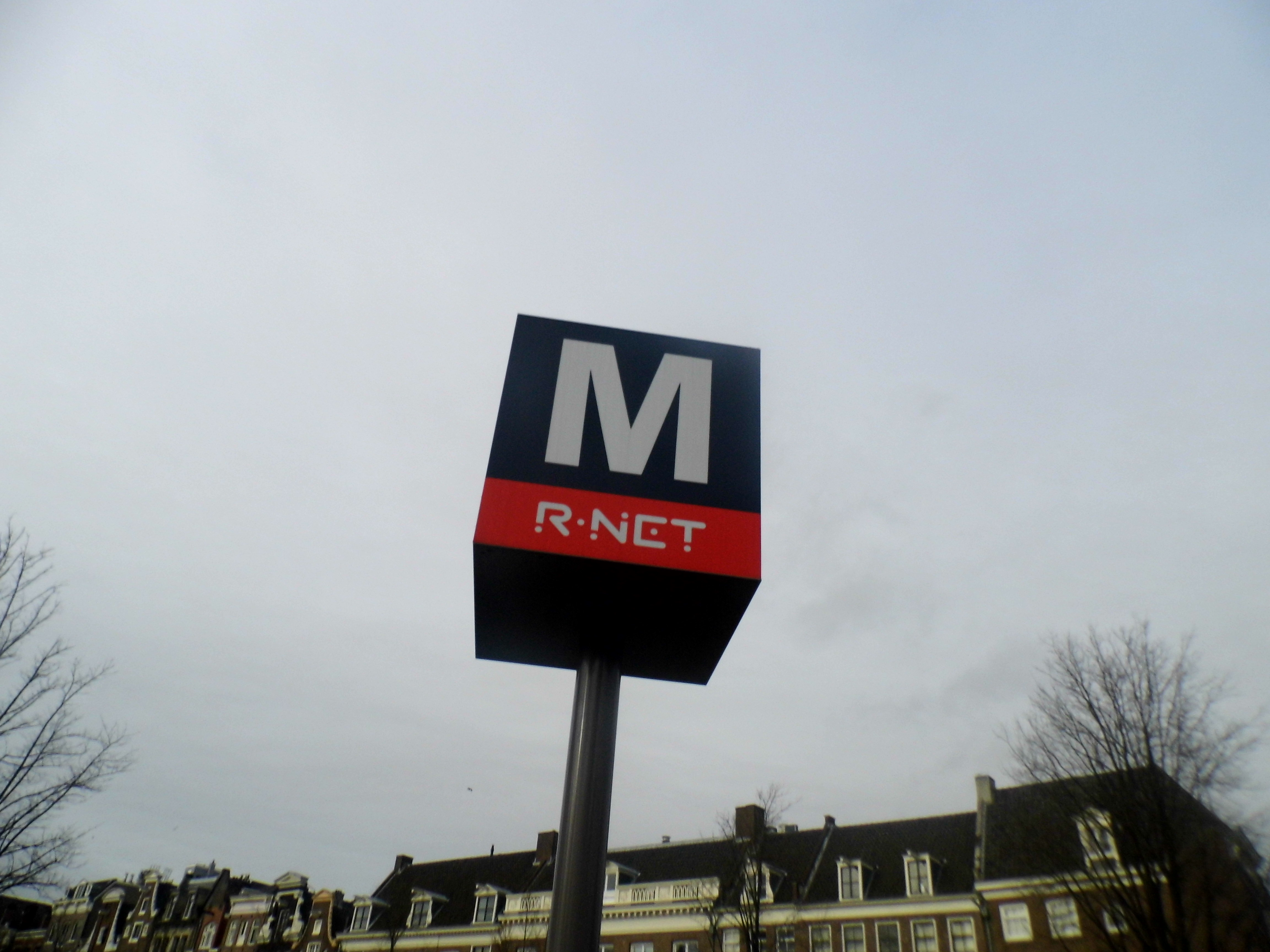 Znaki te można spotkać przy każdej stacji metra.